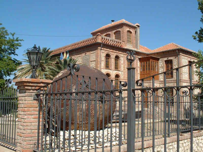 Ayuntamiento de Benalúa (Granada, España)